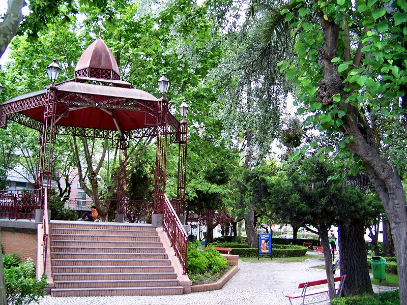 Jardim de Sacavem construído no ano de 1950 / /